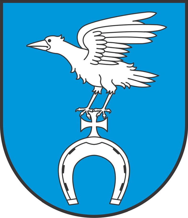 Herb gminy Wyszki